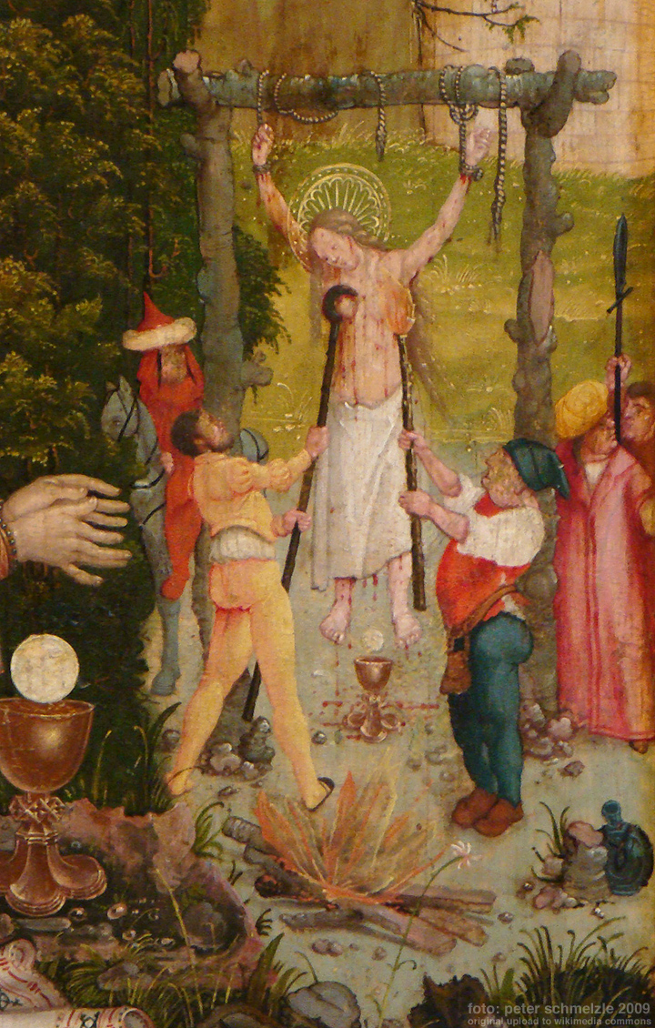 Detail vom Barbara-Altar der Stadtkirche Schwaigern